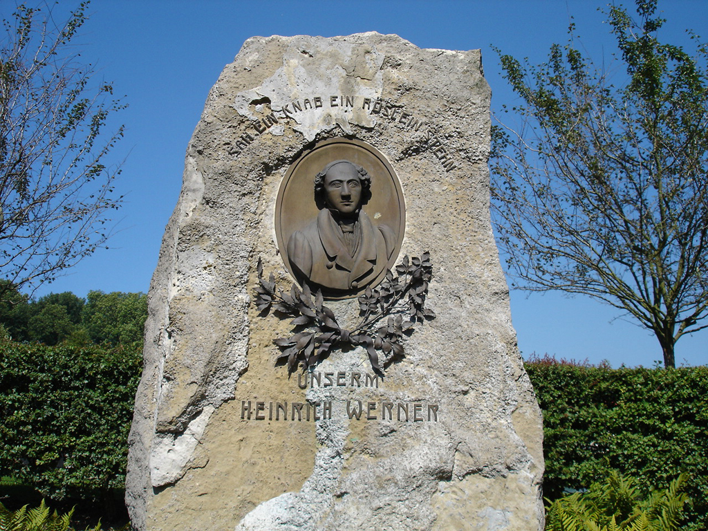 Heinrich-Werner-Gedenkstein in Kirchohmfeld